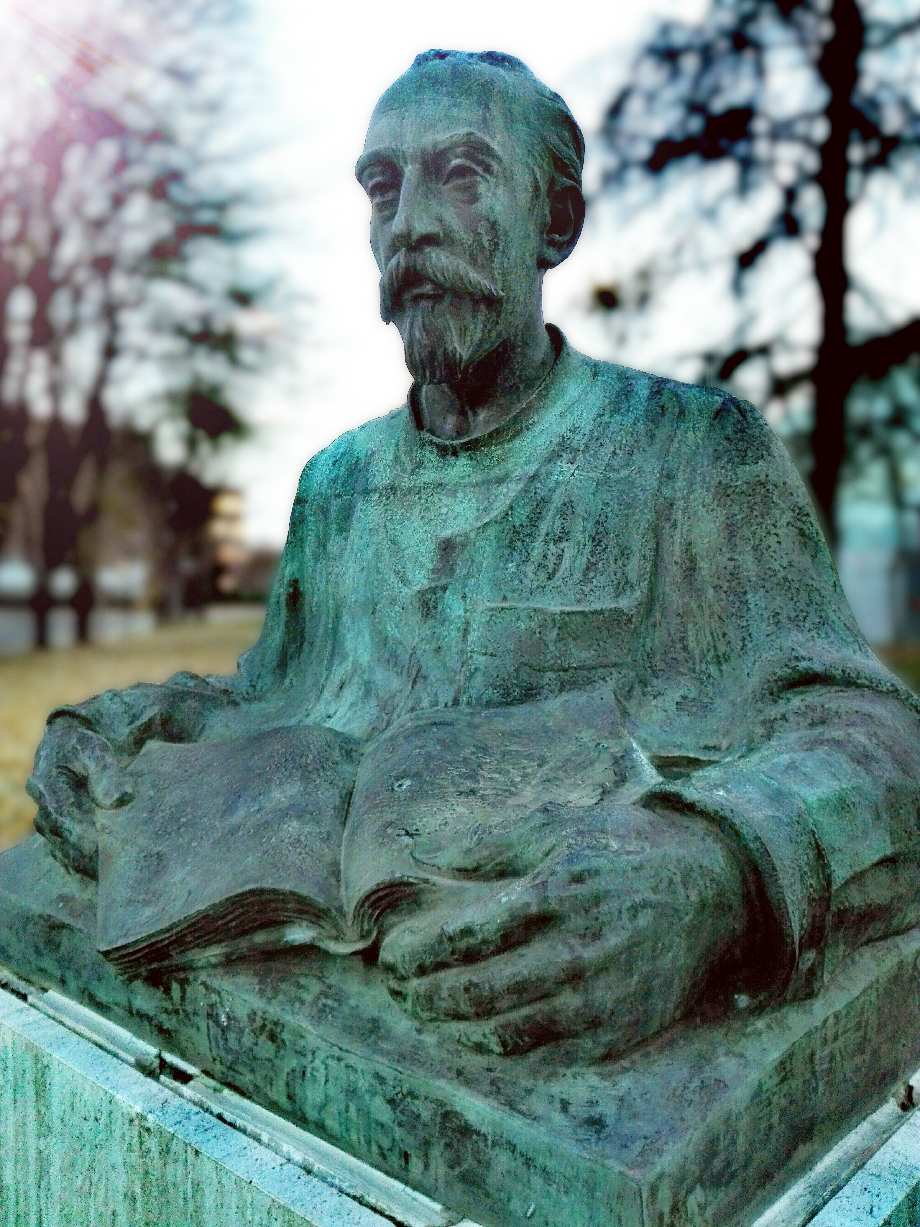 Monumento a Nicasio Landa en Pamplona Original